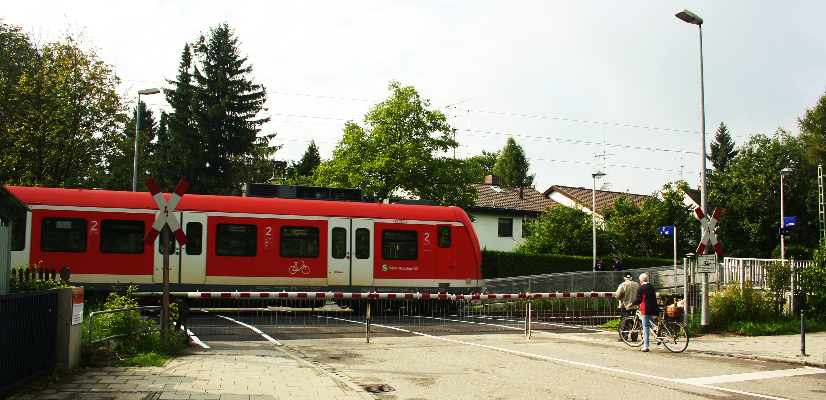 Beschrankter Bahnübergang in Pullach i. Isartal. S7 quert und fährt in den Bahnhof Pullach ein.